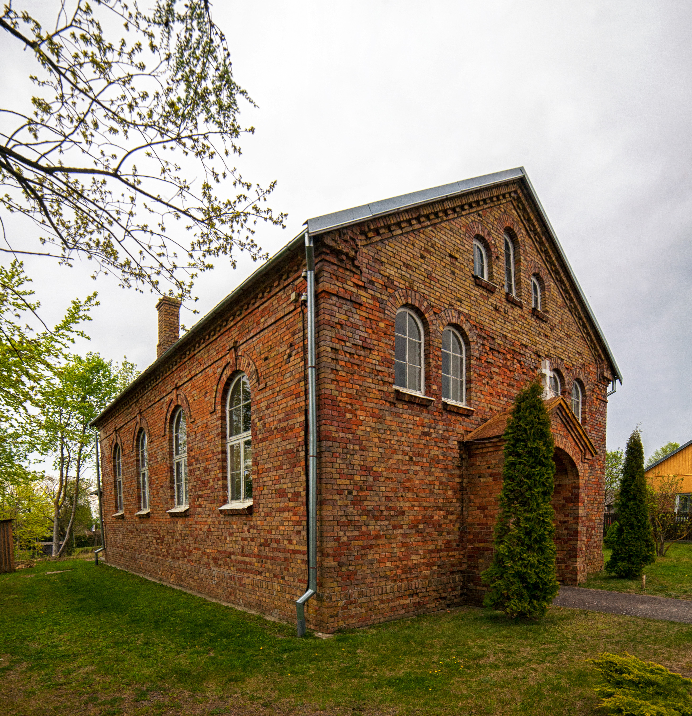 Pāvilostas luterāņu baznīca